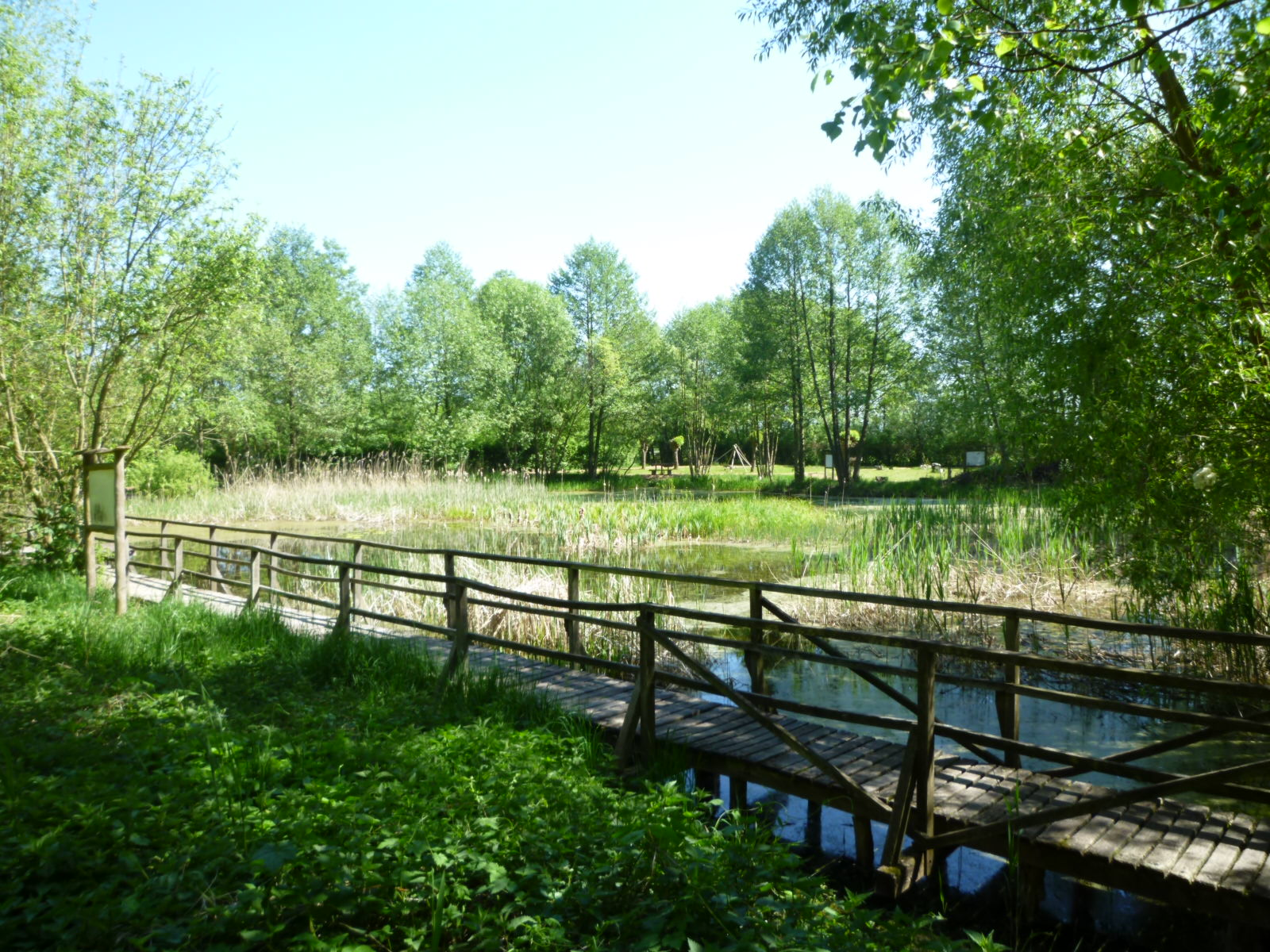 Drömlingsinformationsareal Kämkerhorst bei Calvörde, 2011, Der Große Teich